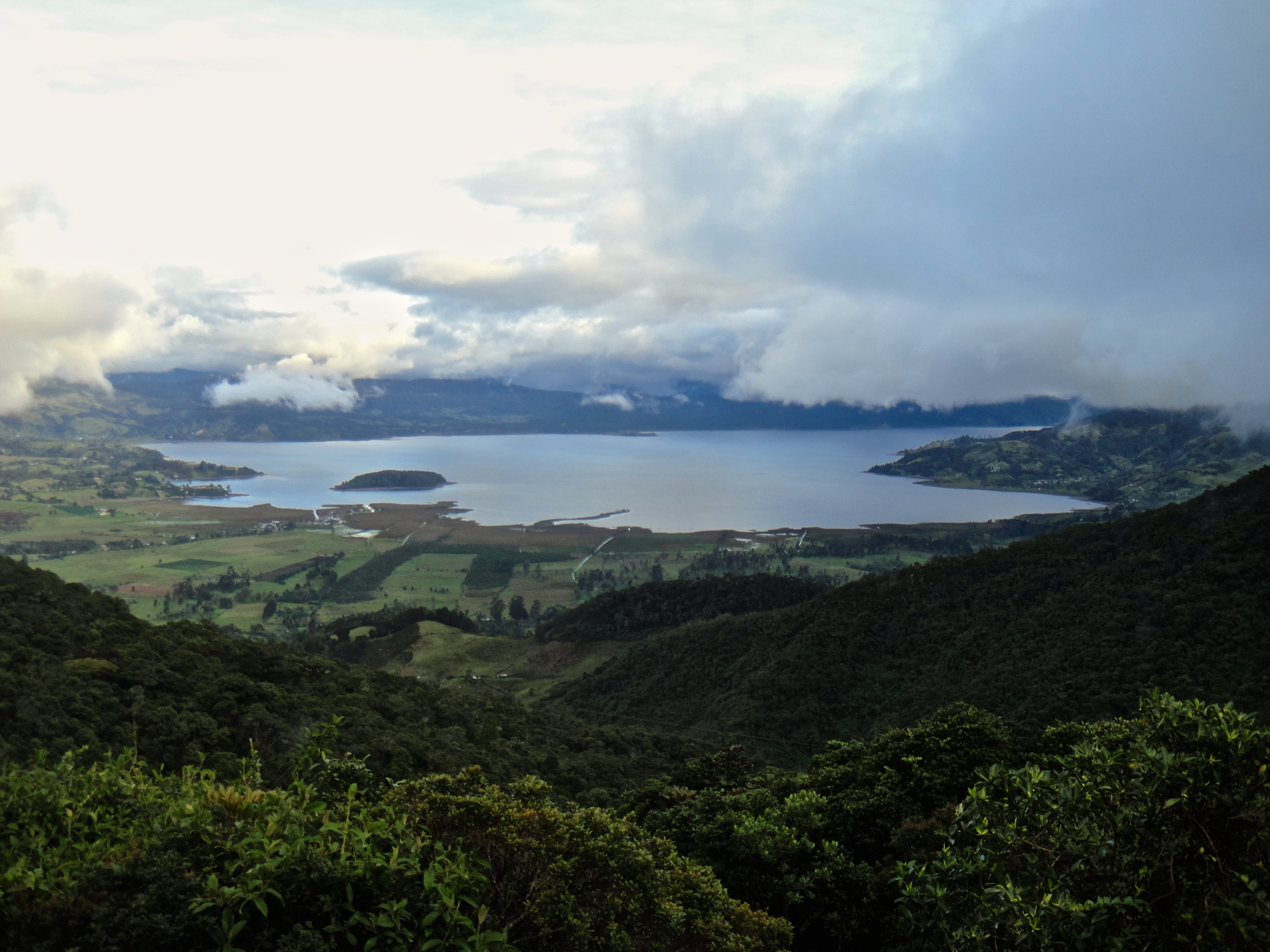 En esta fotografía se observa la Laguna de la Cocha y la Isla de La Corota. Ubicación: PASTO, NARIÑO